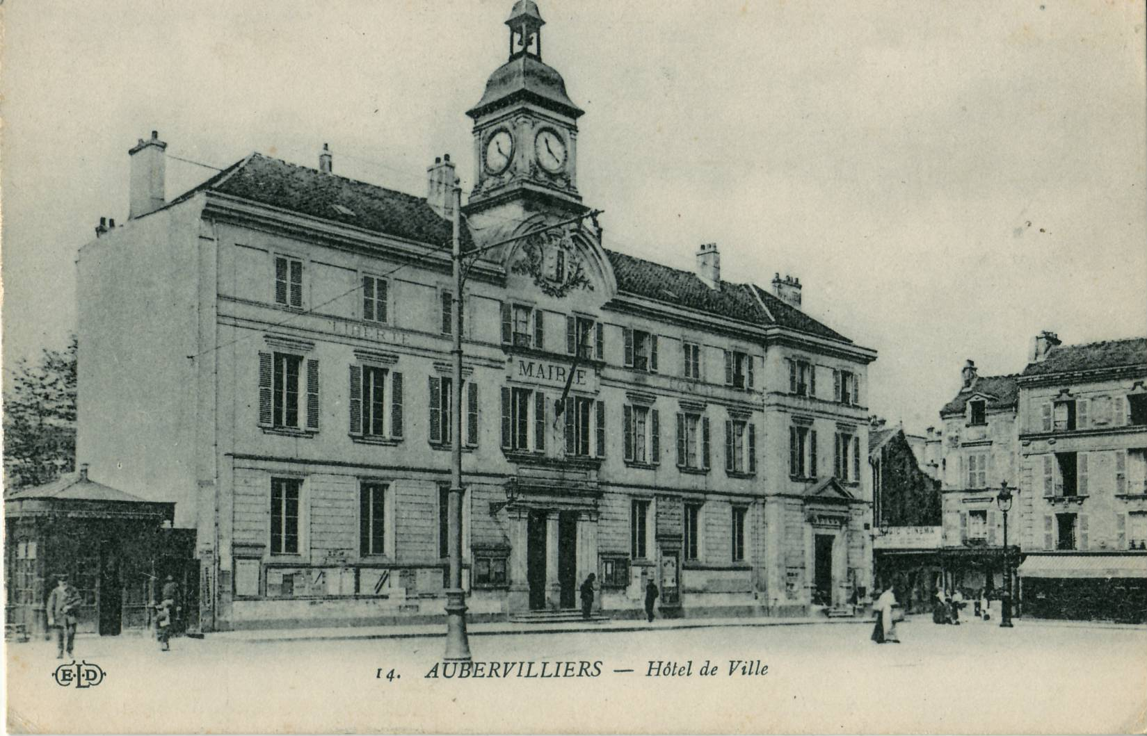 Carte postale ancienne éditée par ELD, n°14 : AUBERVILLIERS - Hôtel de Ville L'Hôtel de Ville dans son état initial, avant ses agrandissements contemporains, et, à gauche, le kiosque des tramways